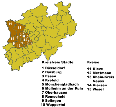 Karte des Regierungsbezirks Düsseldorf Anpassung einer Vorlage von 03:42, 29. Apr 2003 Hagbard 263 x 245 (39498 Byte) (Karte des Regierungsbezirks Düsseldorf)